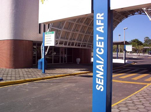 Foro SENAI CETAFR